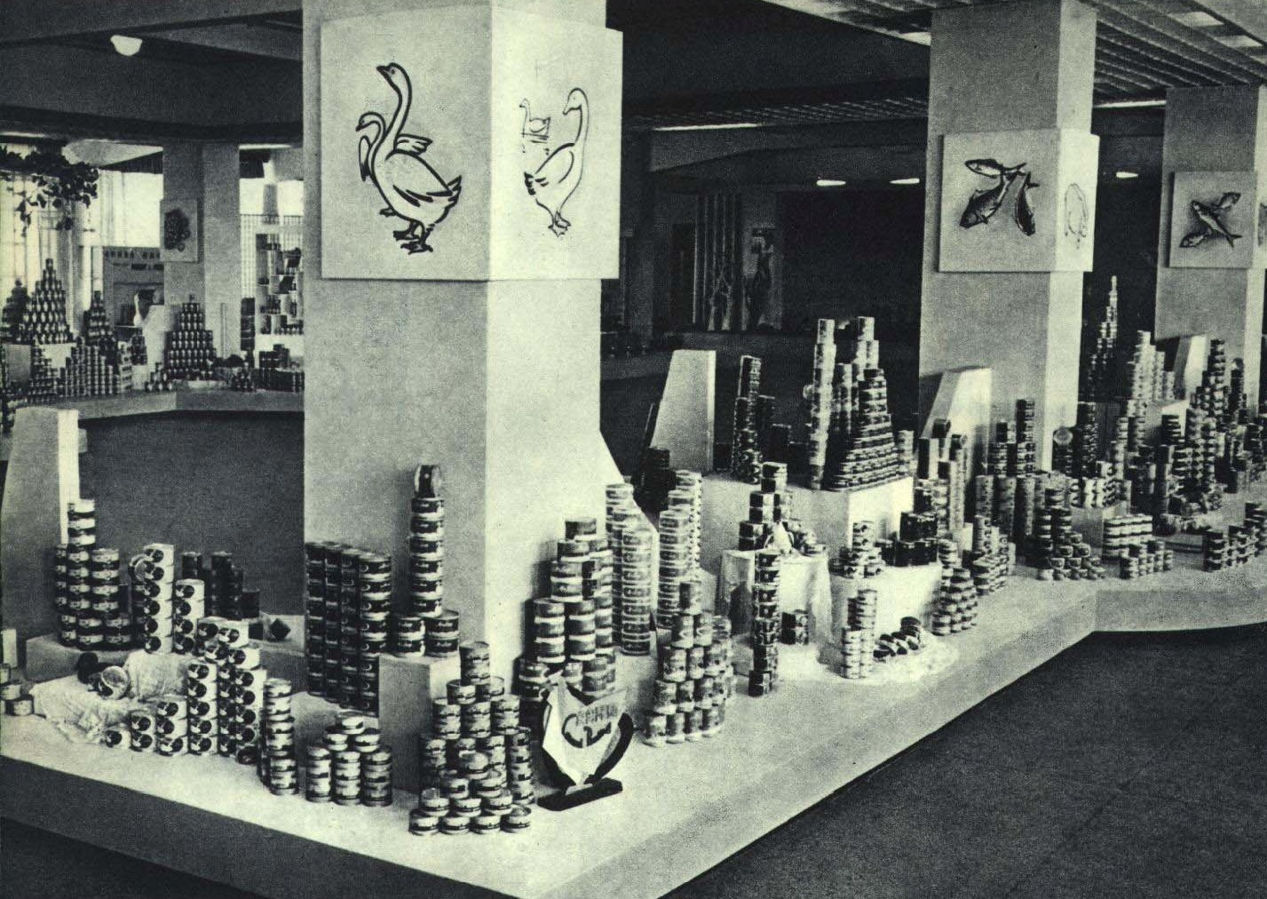 1963-03 1963年 中国出口商品交易会